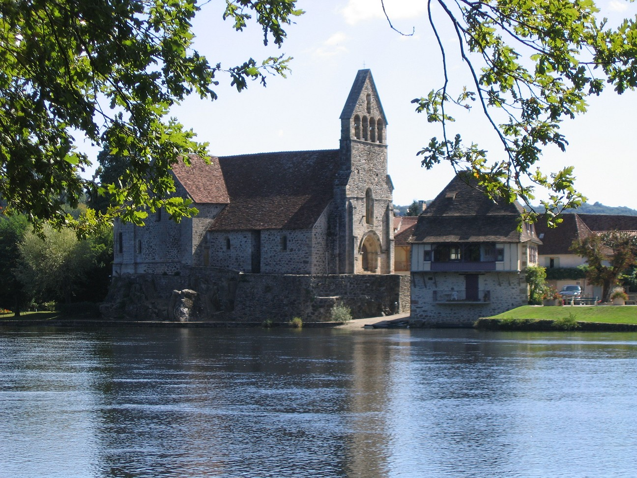 Beaulieu-sur-Dordogne, Büßerkapelle